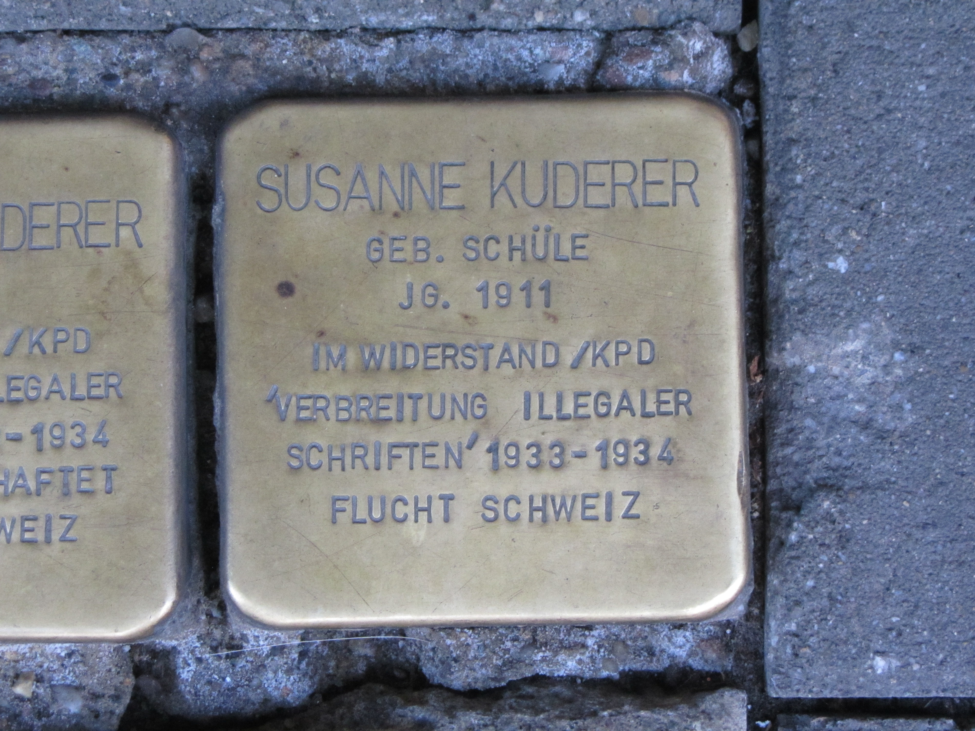 der Stolperstein für Susanne Kuderer vor dem Haus Ekkehardstraße 15 in Singen